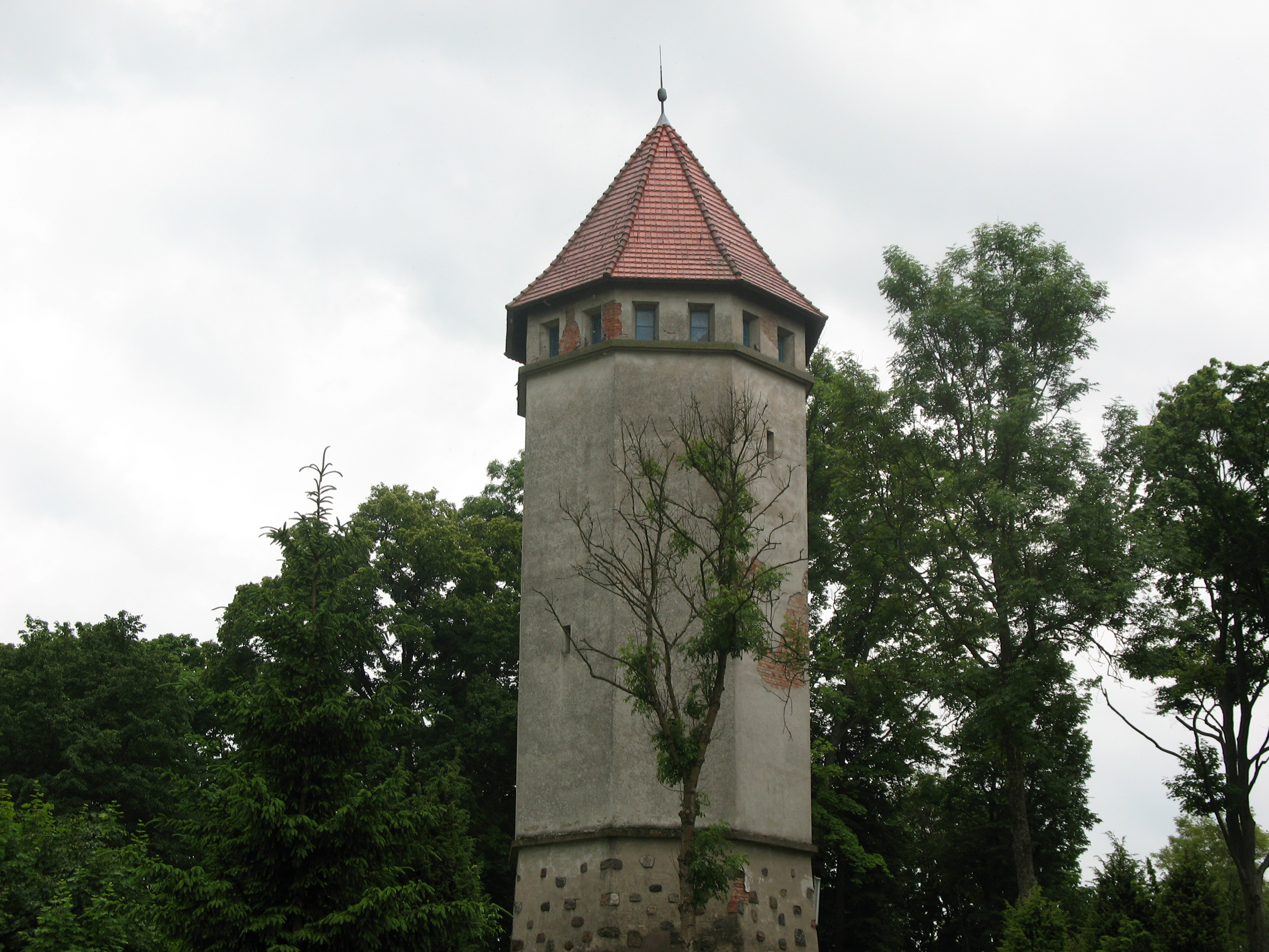 Wieża ciśnień w Rynie. 07.1986.